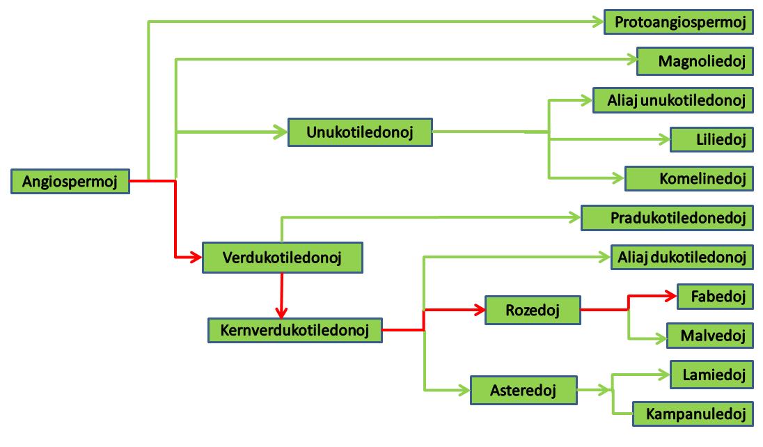 sistematiko de fabedoj